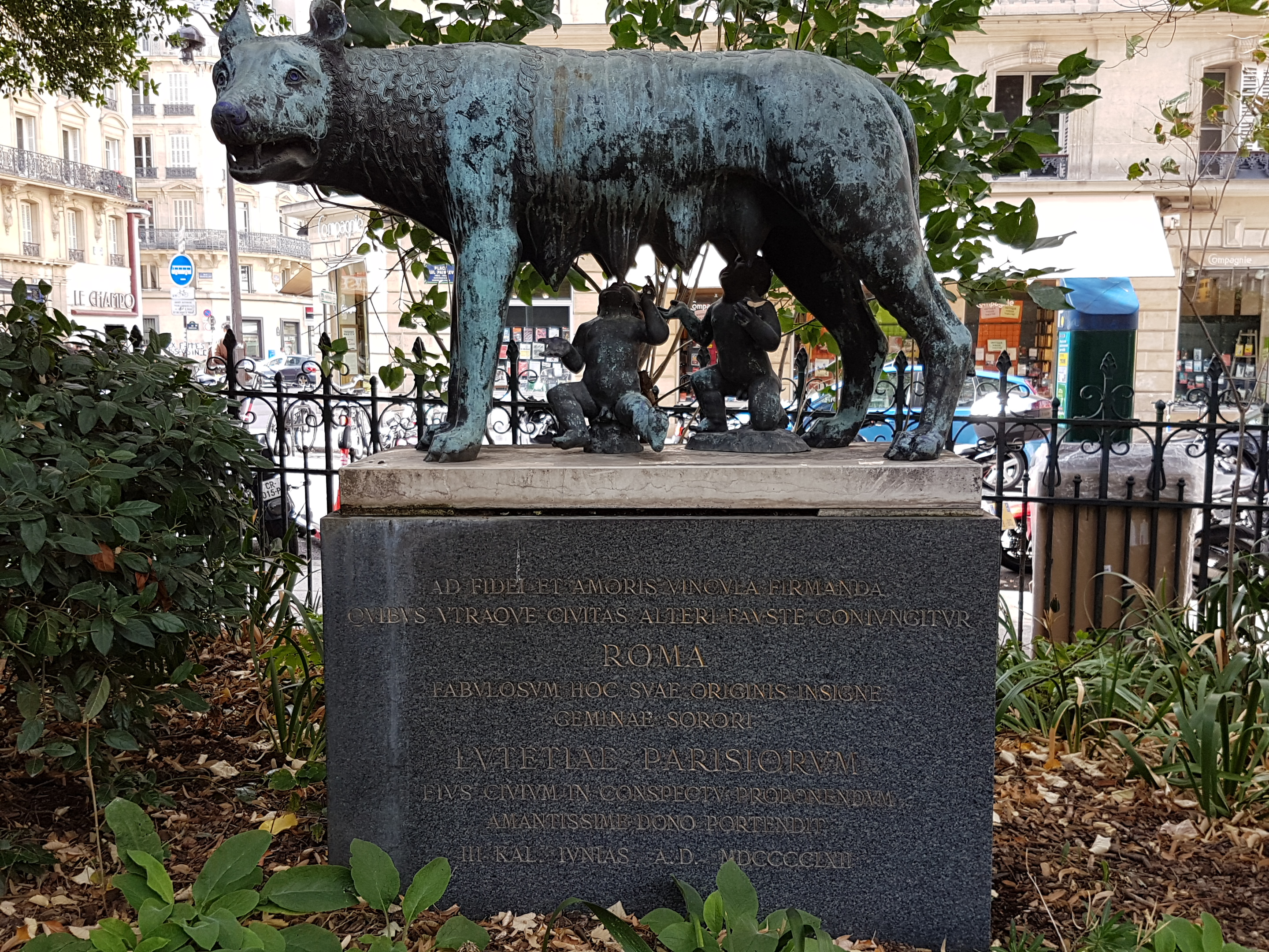 Sculpture de Louve capitoline offerte par la ville de Rome à celle de Paris lors du jumelage des deux villes. Square Paul-Painlevé, 5e arrondissement, Paris Texte en latin : Ad fidei et amoris vincula firmanda Quibus utraque civitas alteri fauste coniungitur ROMA Fabulosum hoc suae originis insigne geminae sorori LUTETIAE PARISIORUM eius civium in conspectu proponendum amantissime dono portendi III KAL. IUNTAS A. D. MDCCCCLXII